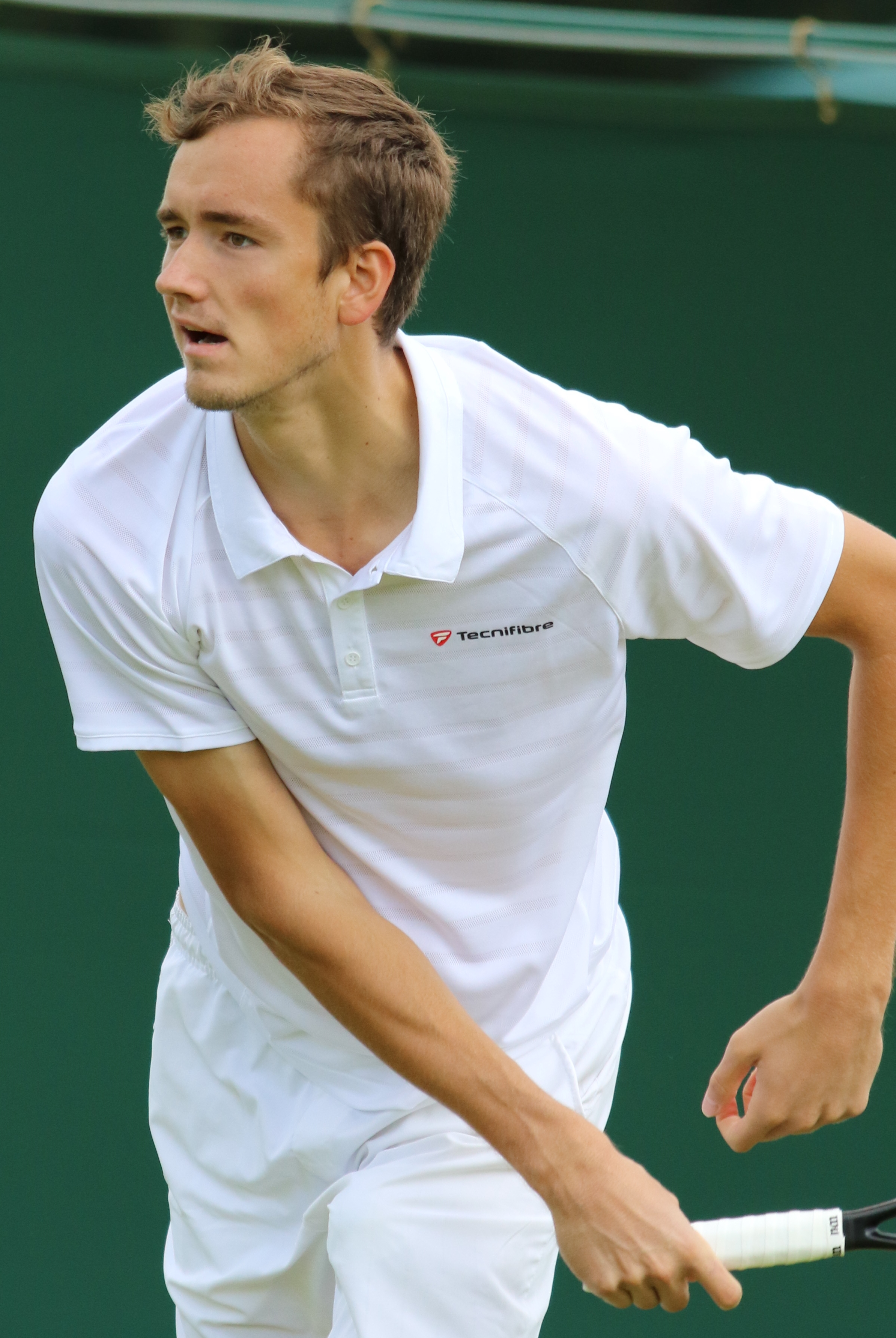 Medvedev WMQ16 (21)